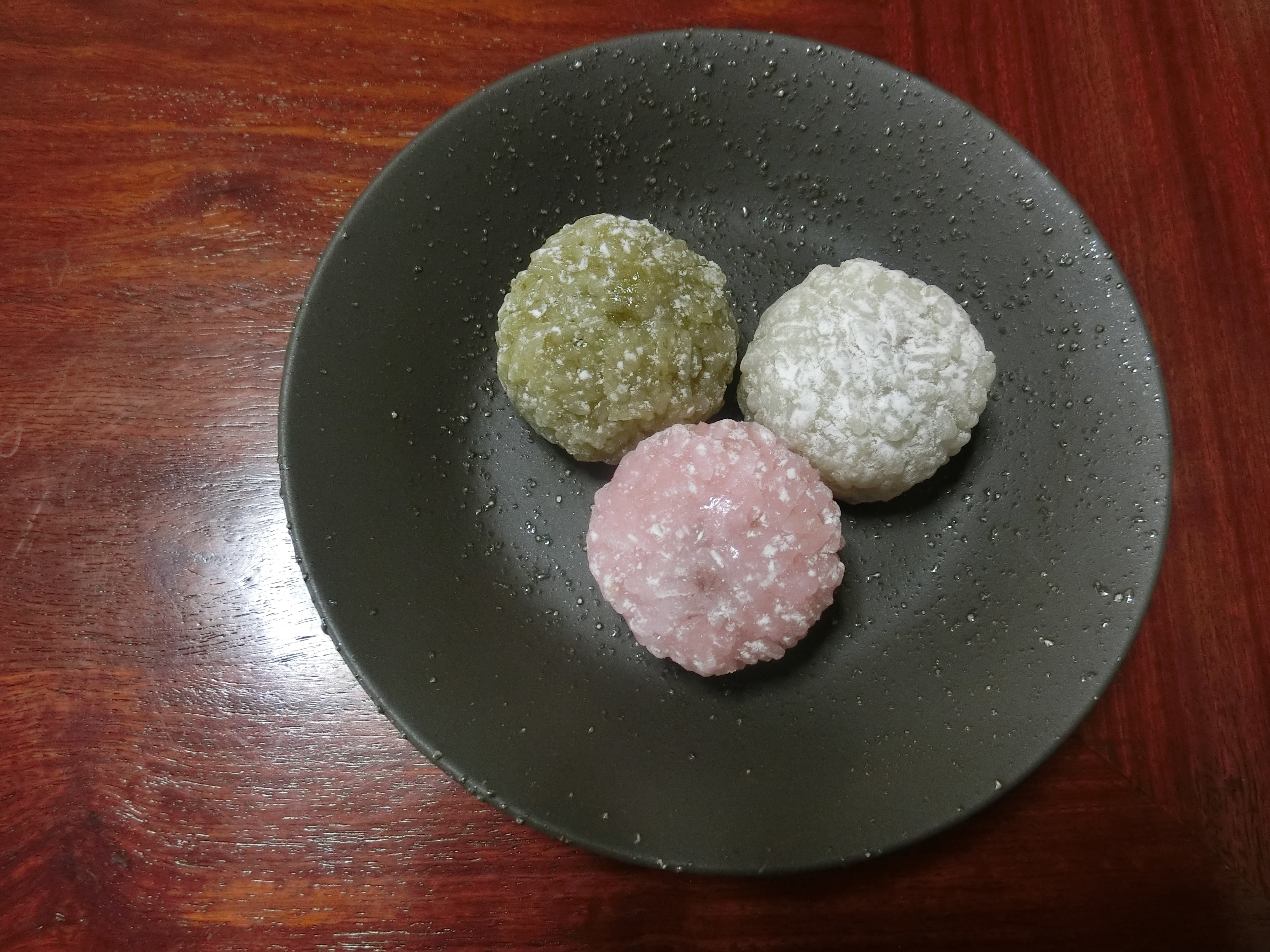 三重県の和菓子